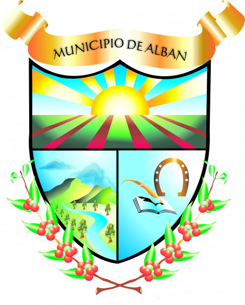 MUNICIPIO DE ALBAN